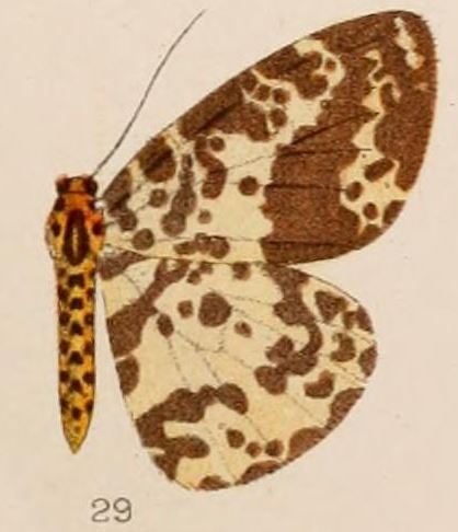 Abraxas latizonata Hampson 1907